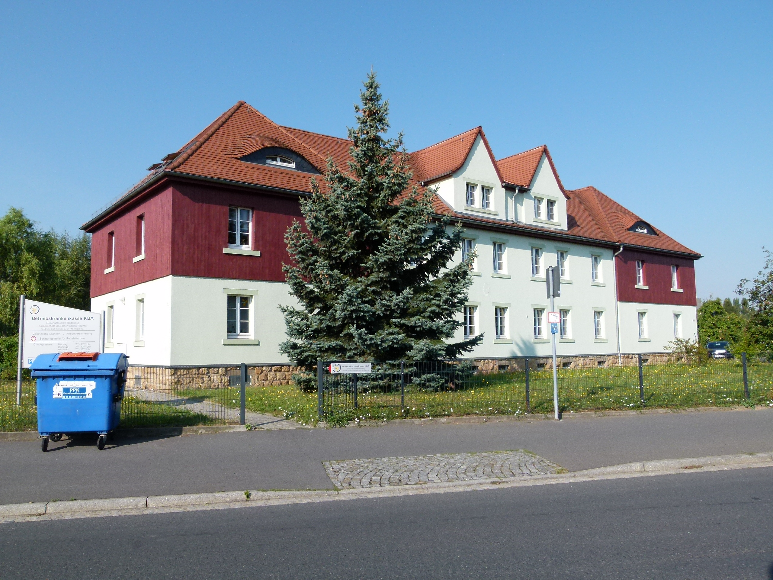 Denkmalgeschütztes Wohnhaus, Kötitzer 125, Radebeul, Sachsen